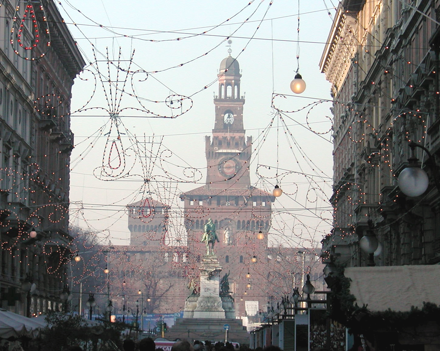 Milano, Italy, Castello Sforzesco. December 2005